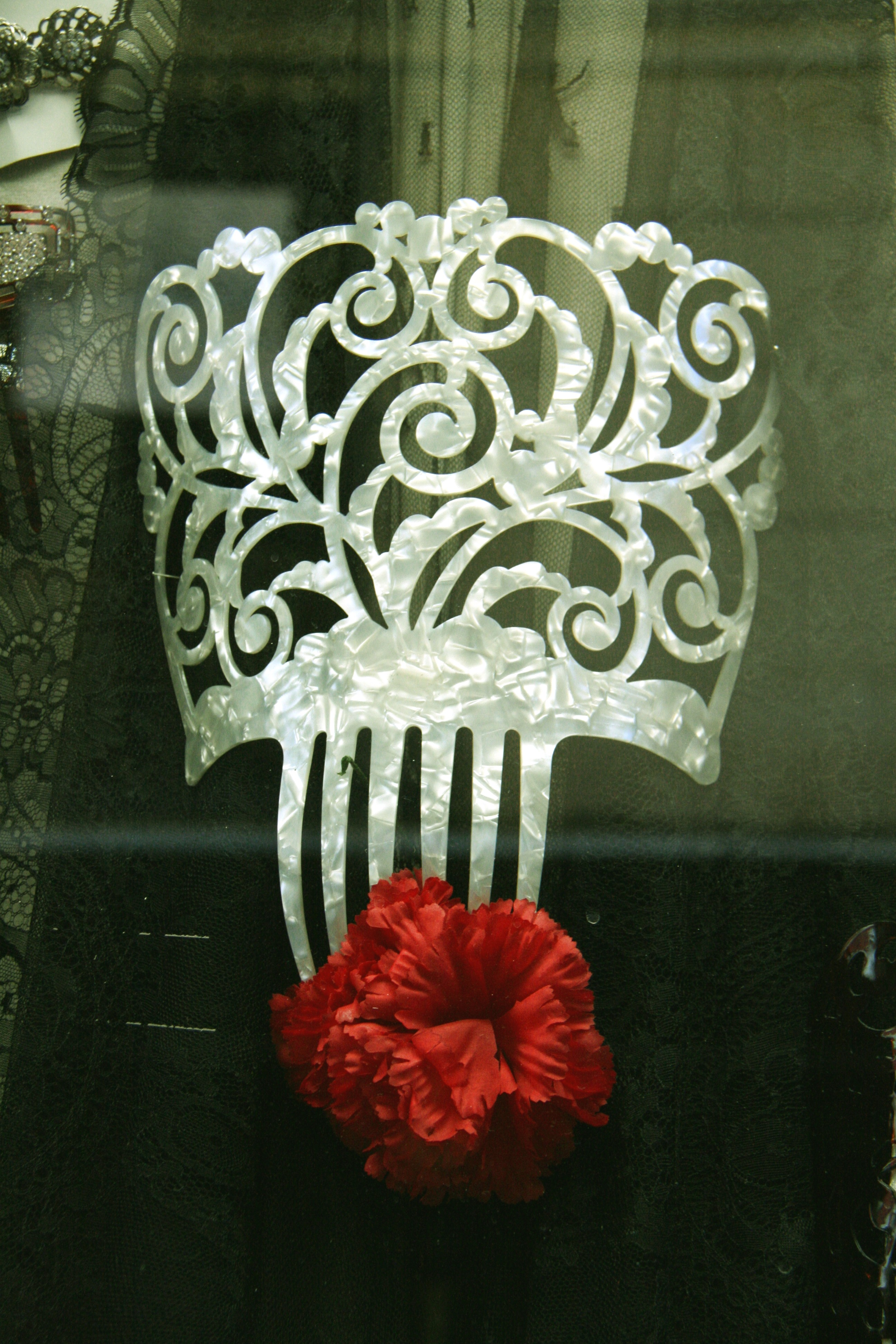 Peineta